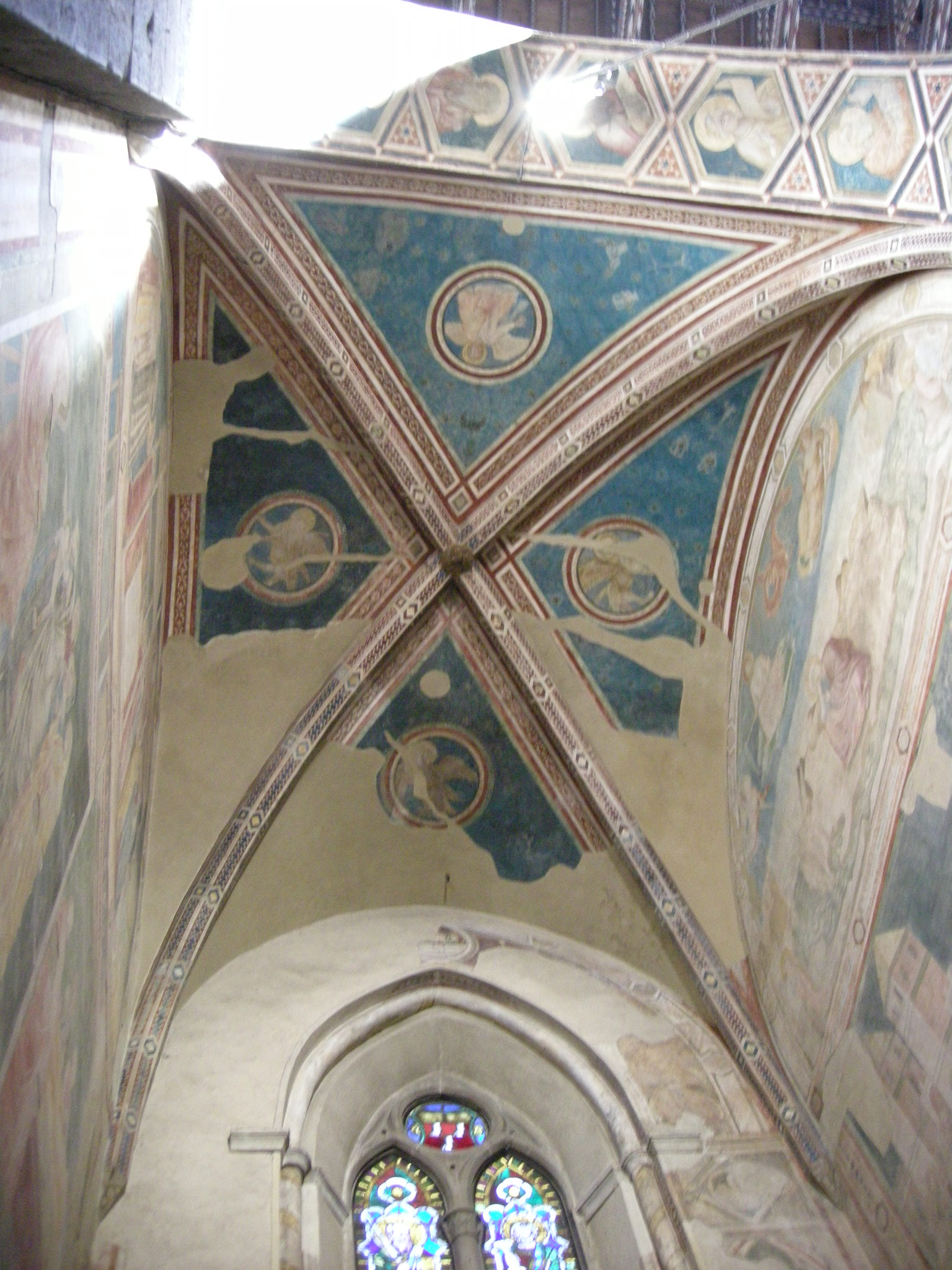 Cappela peruzzi 18